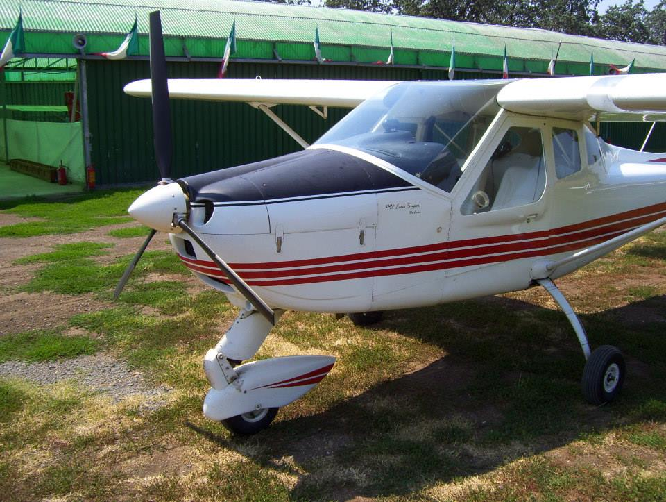 Autore Daniele Rosicarelli, particolare di un tecnam p92